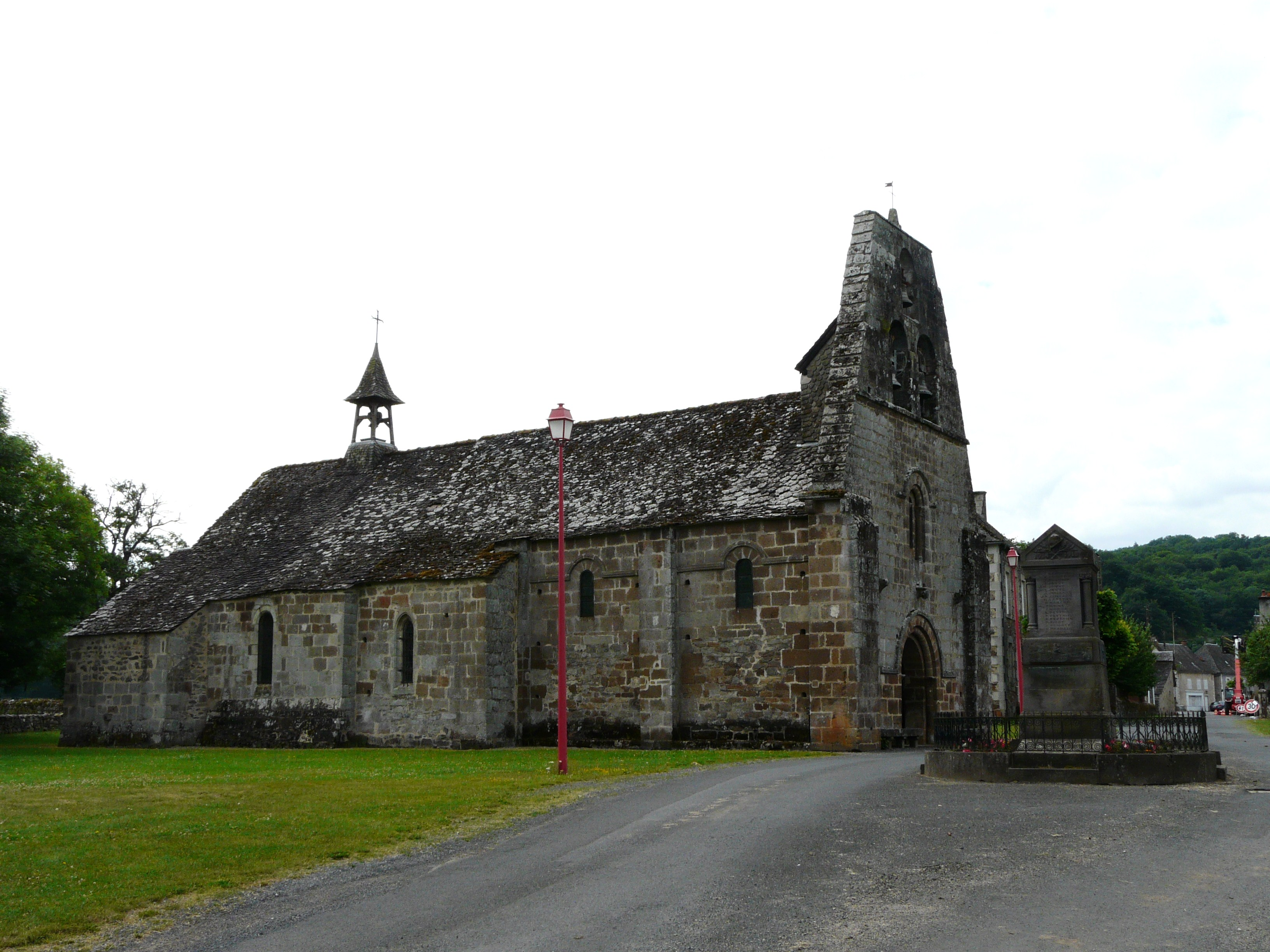 L'église Saint-Maurice et Saint-Louis, Vebret, Cantal, France.